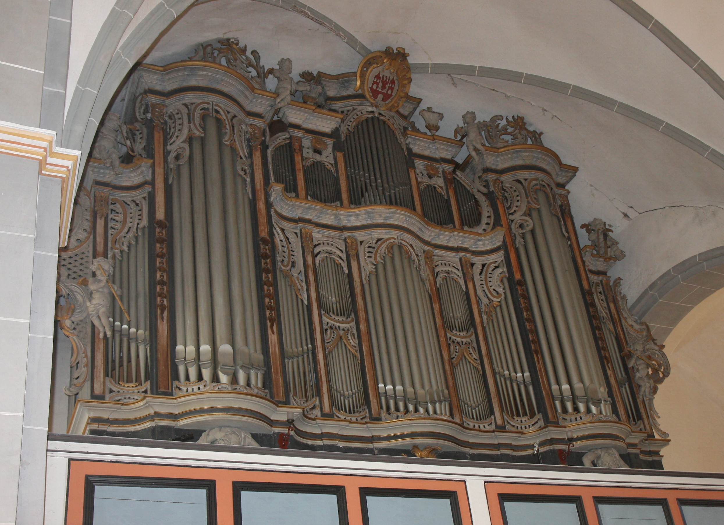 Scholtze-Orgel aus dem Jahr 1754 in der Stadtkirche St. Laurentius in Havelberg, Kirchplatz.